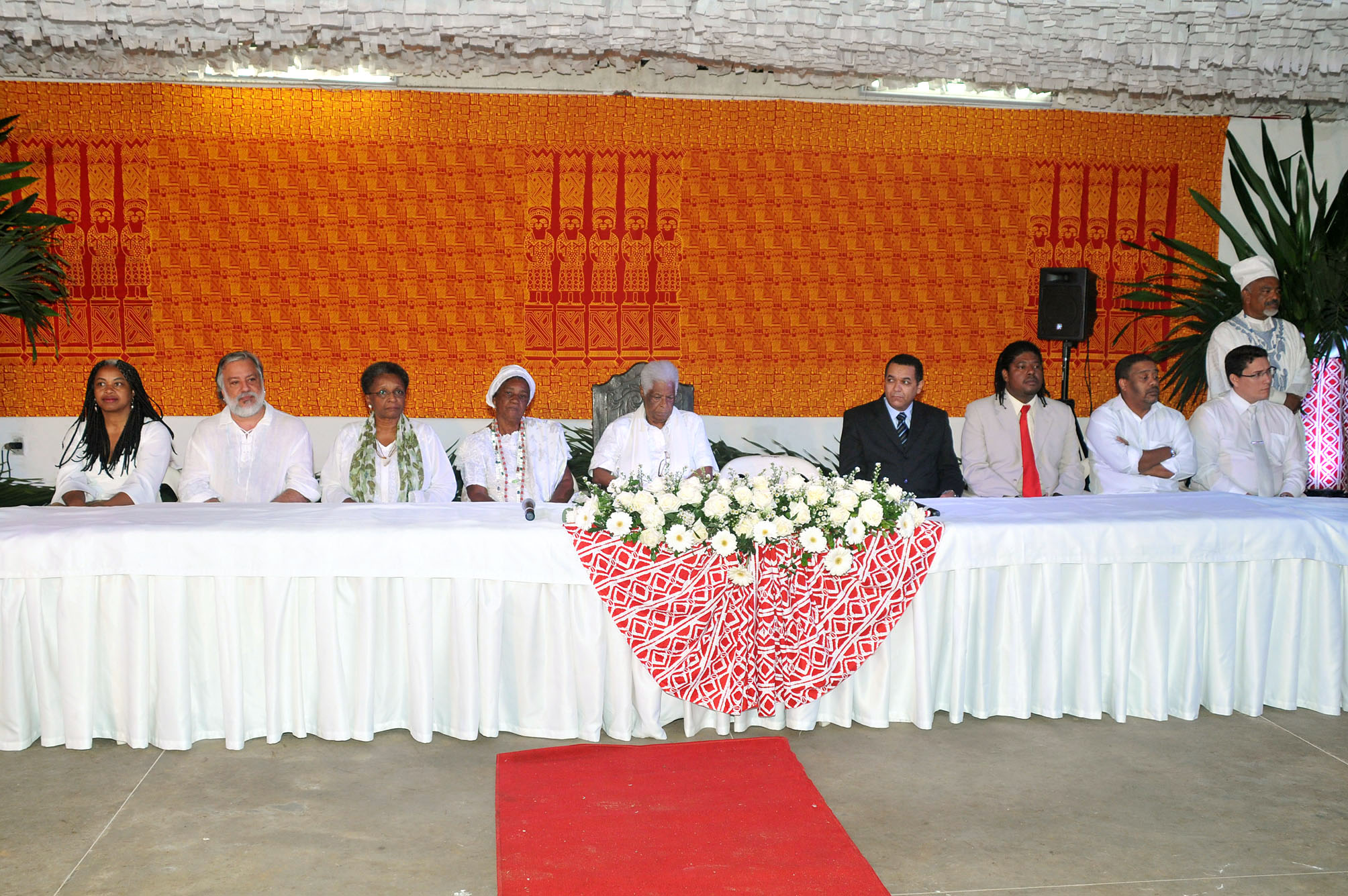 Comemoracao dos "100 ANOS DO CANDOMBLÉ DE SÃO GONÇALO: E DAÍ, NASCEU O ENCANTO! ILÊ AXÉ OPO AFONJA" na foto: Olivia Santana(vereadora), Marcio Meirelles(Secretario de Cultura da Bahia), Luiza Bairros(socióloga e secretária da Sepromi), Iakekere Nitinha de Iemanja, Mae Stella, Eloi Auaujo(Ministro da Secretaria de Políticas de Promoção da Igualdade Racial), Alexandre Reis(subsecretário da Seppir) e Elias de Oliveira Sampaio(diretor presidente da Prodeb) e Jackson Augusto Gonçalves Jacques(diretor regional dos Correios na Bahia) Data: 30/07/2010 Foto: Roberto Abreu